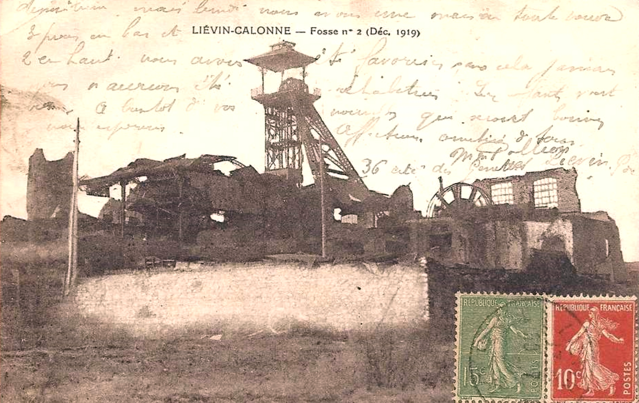 Fosse n° 2 de la Compagnie des mines de Liévin, Liévin, Pas-de-Calais, Nord-Pas-de-Calais, France.